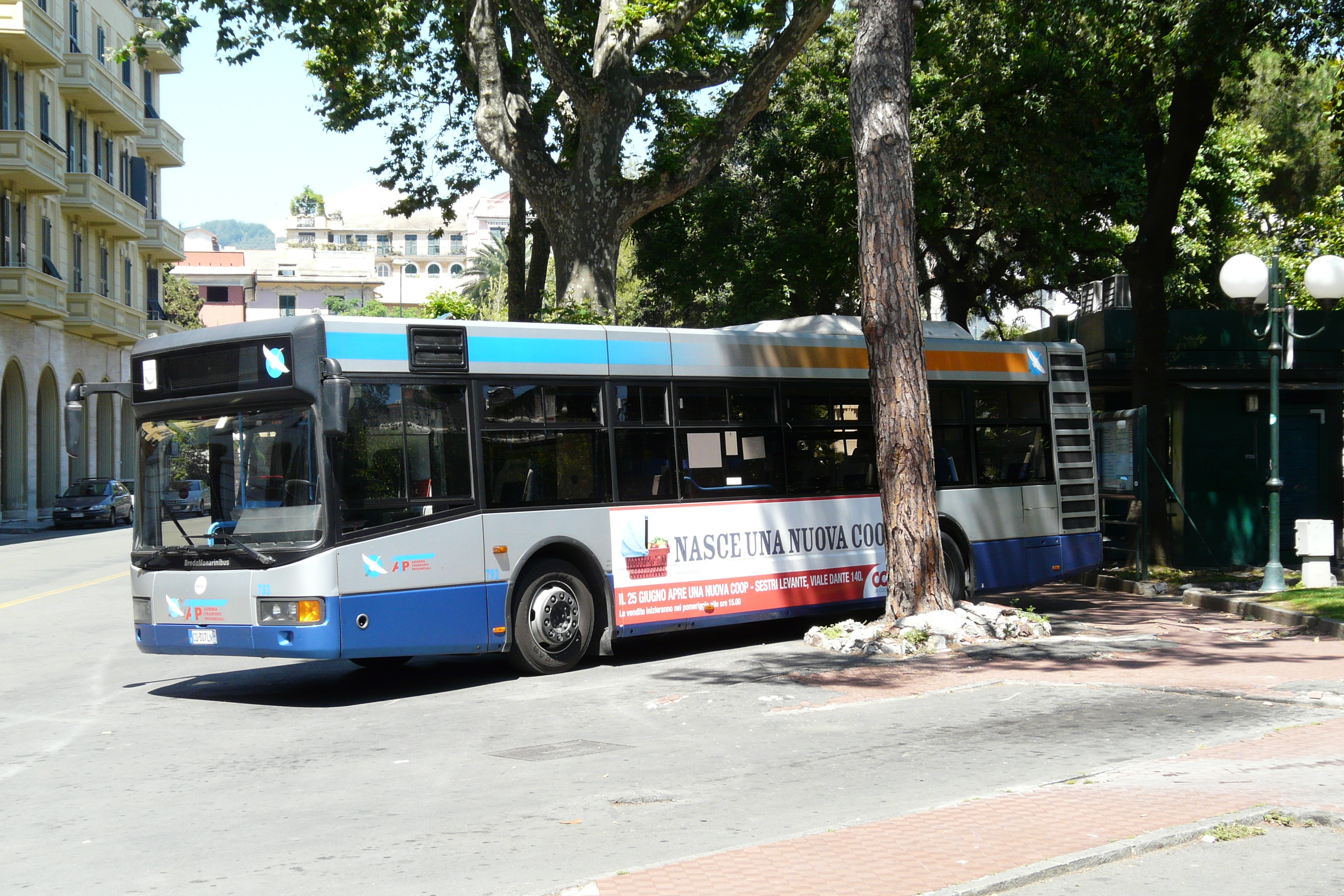 Autobus dell'A.T.P. presso il capolinea, Chiavari, Liguria, Italia